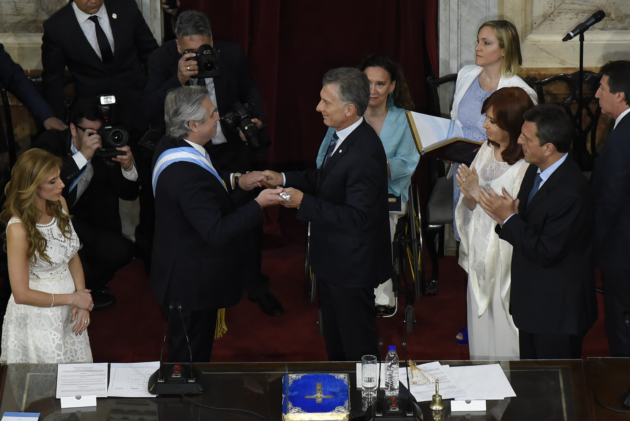 En una histórica ceremonia, Alberto Fernández juró como presidente de la Nación y recibió los atributos de mando de manos de su antecesor, Mauricio Macri. Fue ante la Asamblea Legislativa que sesionó, a partir de las 11:15, en el recinto de la Cámara de Diputados de la Nación. También prestó juramento Cristina Fernández de Kirchner como Vicepresidenta de la Nación.